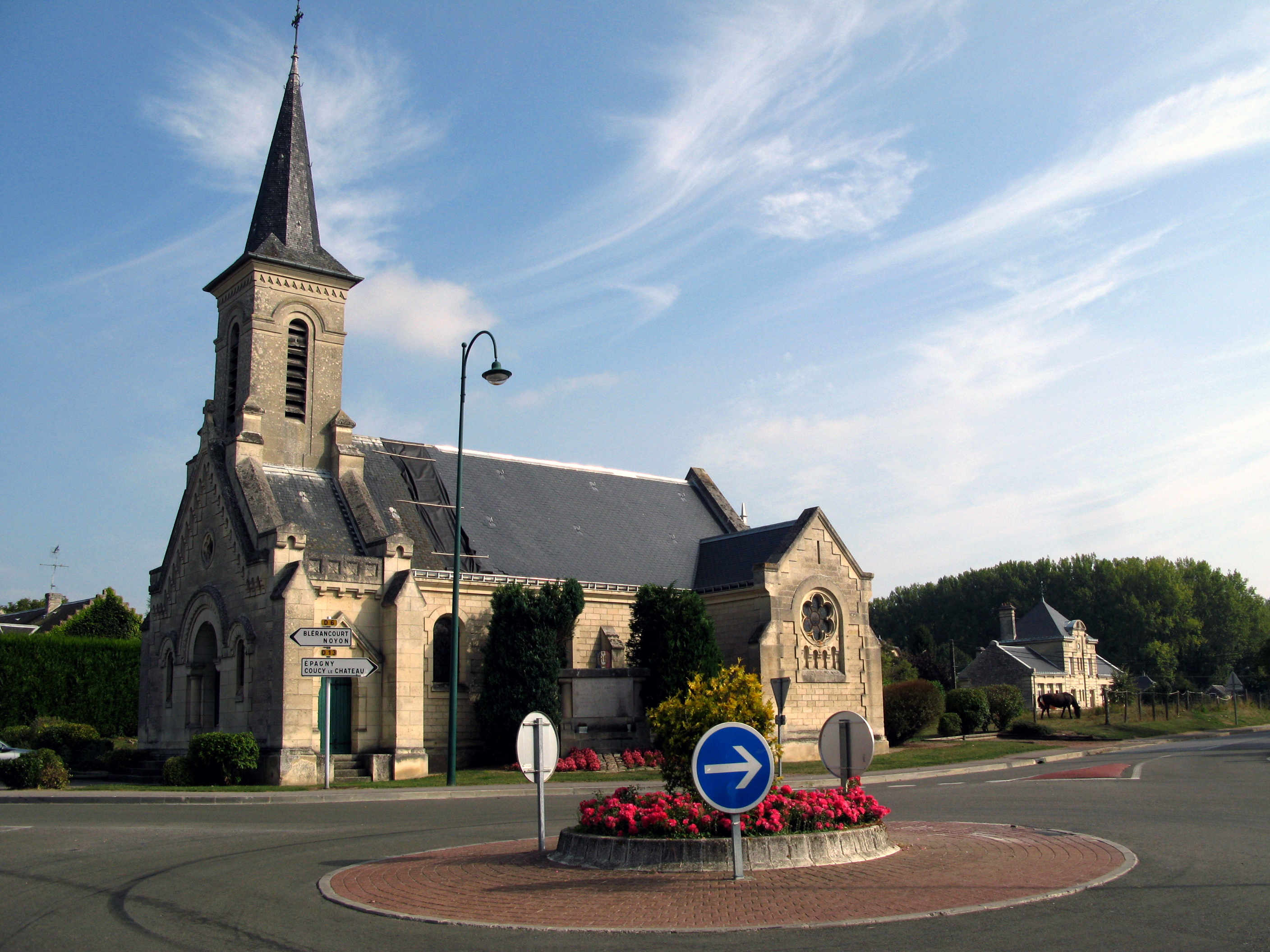 Vézaponin (Aisne, France) - L'église et, plus à droite, la mairie-école. On remarque qu'une partie du toit est bâchée. .